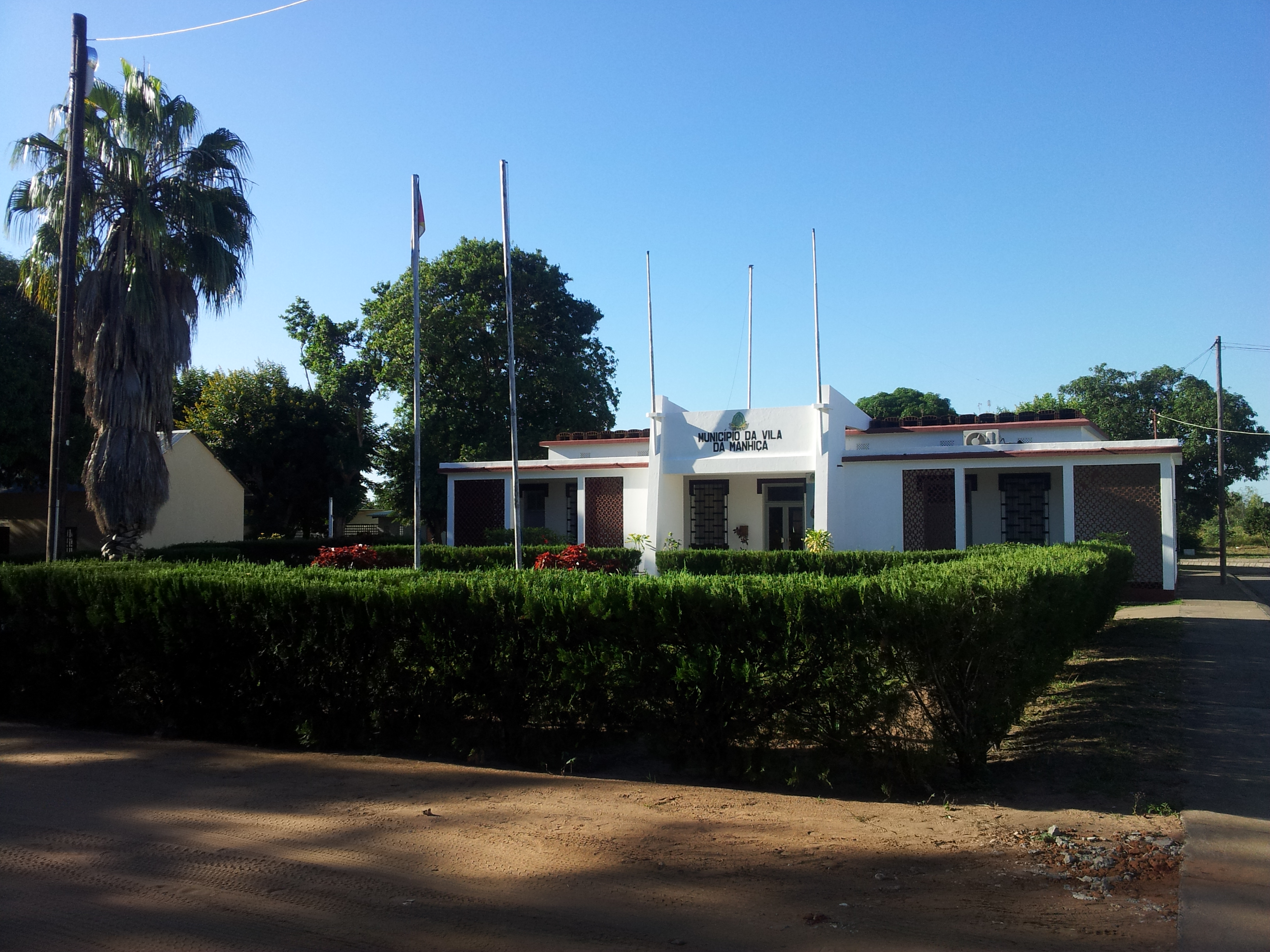 Conselho Municipal de Manhiça, Moçambique